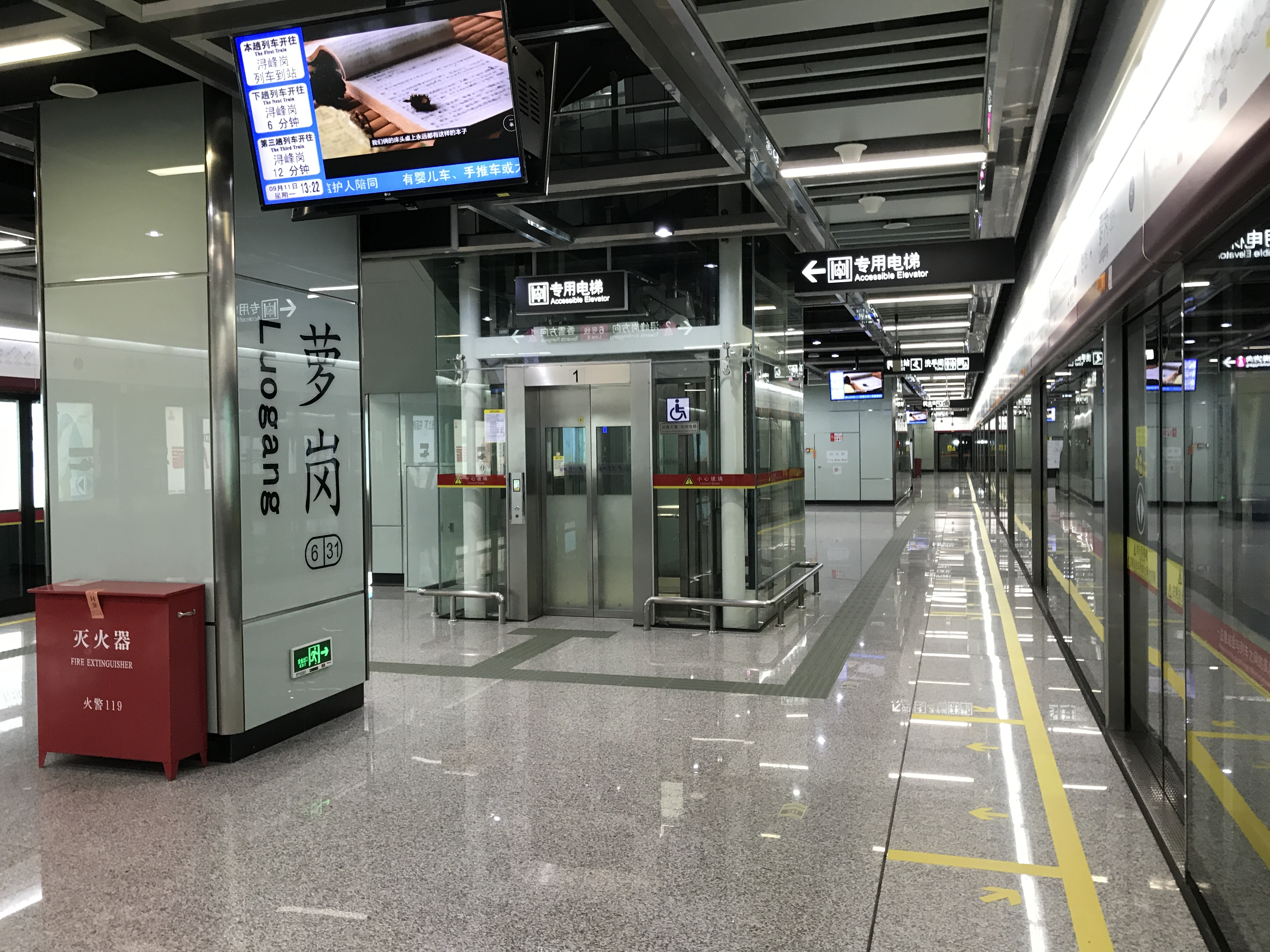 广州地铁萝岗站